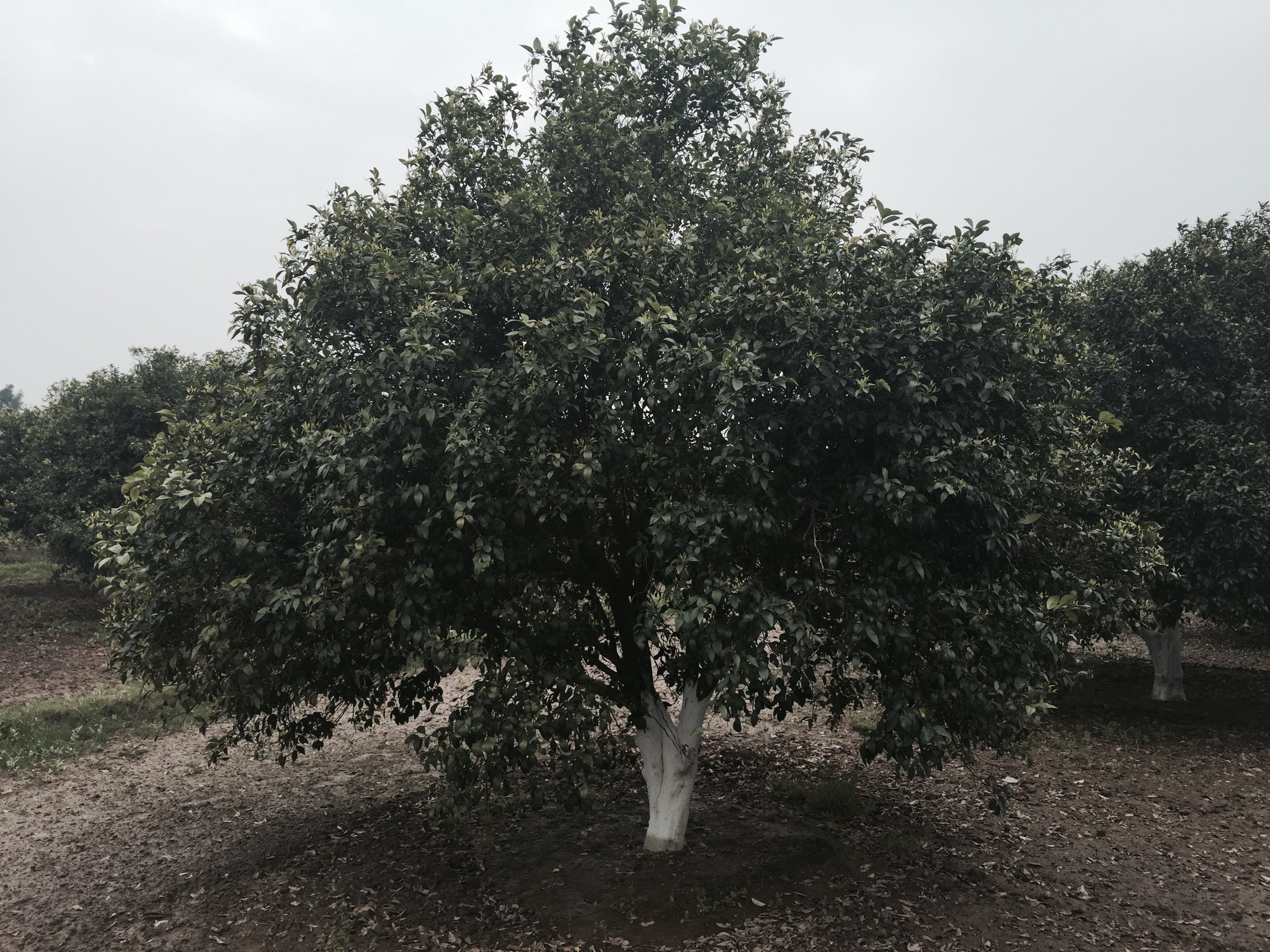 میاں فارم